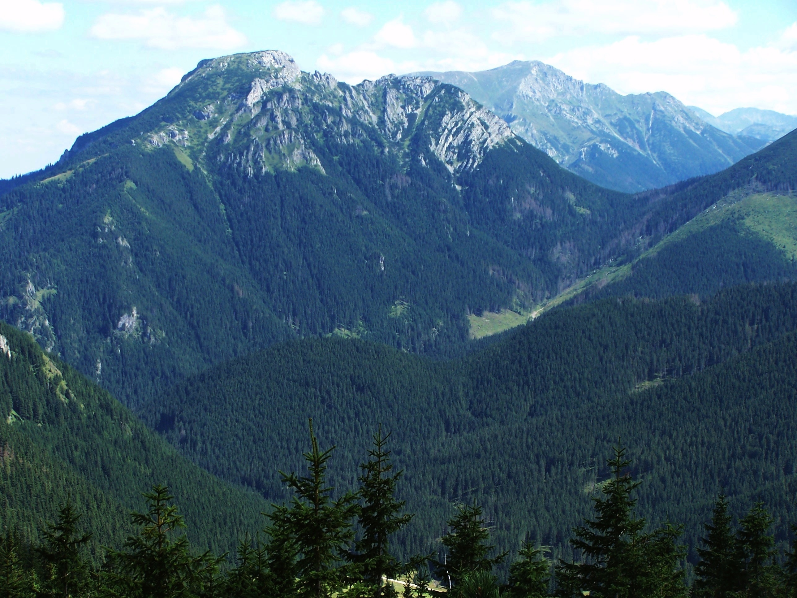 Widok z Grzesia. Na pierwszym planie widoczne: Kominiarski Wierch, Dolina Iwaniacka, Iwaniacka Przełęcz fragment stoku Ornaka, w dole: Wielki Kopieniec, Kopieniacki Przechód, Mały Kopieniec, żleb Krowiniec. W głębi Ciemniak